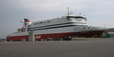 Superfast IX